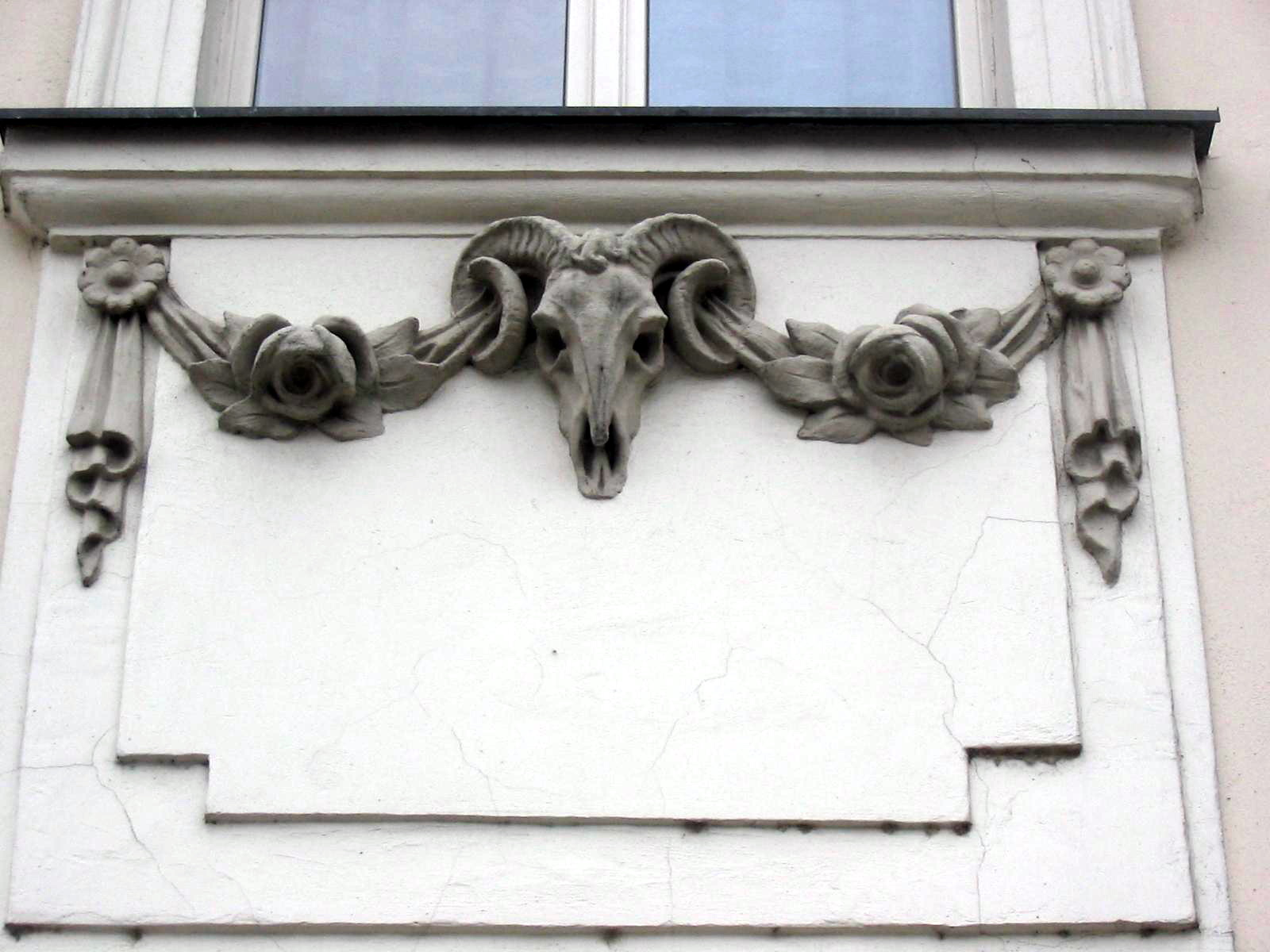 Aegikranion - w starożytności element dekoracji w formie płaskorzeźby na metopach fryzów w postaci czaszki (rzadziej głowy) kozła lub barana w ujęciu frontalnym.